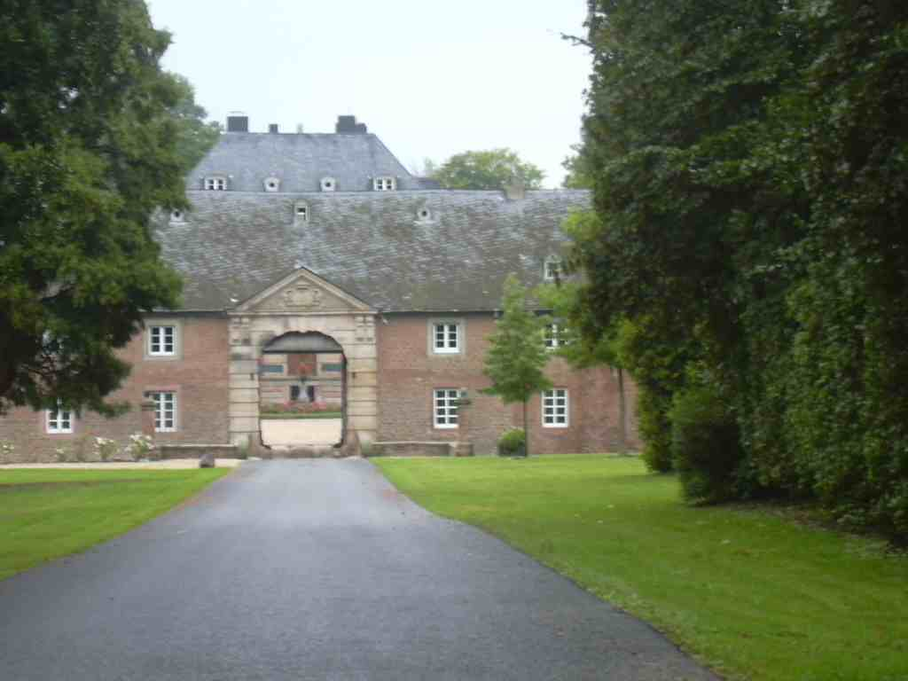 Müddersheim (Vettweiß), Burgeinfahrt own work papa1234 2006-08-11